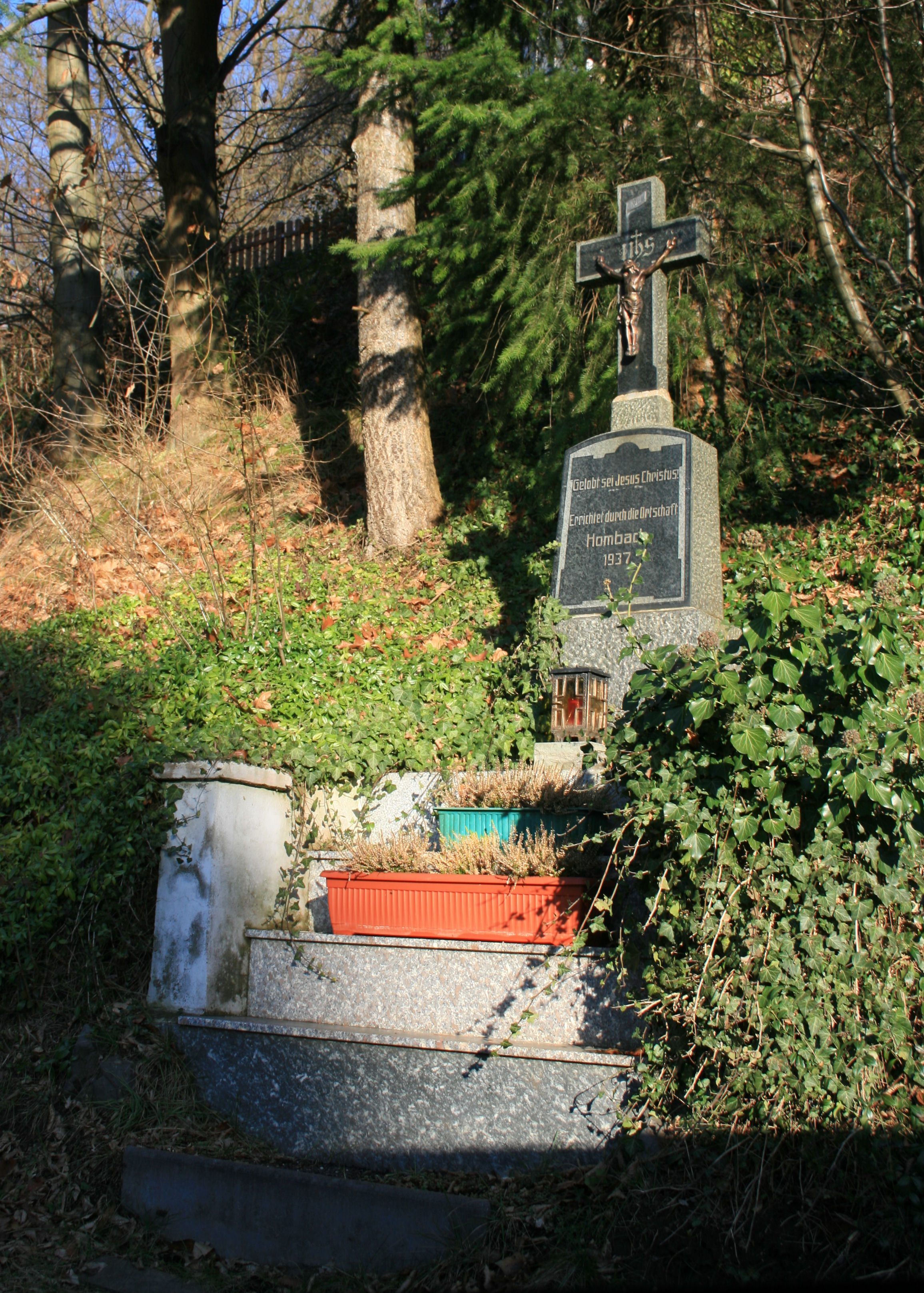 Wegkreuz Eitorf-Hombach